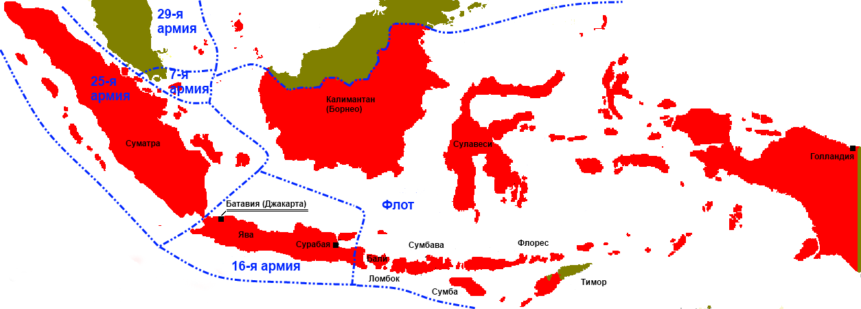 Карта Индонезии во время японской оккупации, разделенной на зоны ответственности между японскими армиями и флотом.